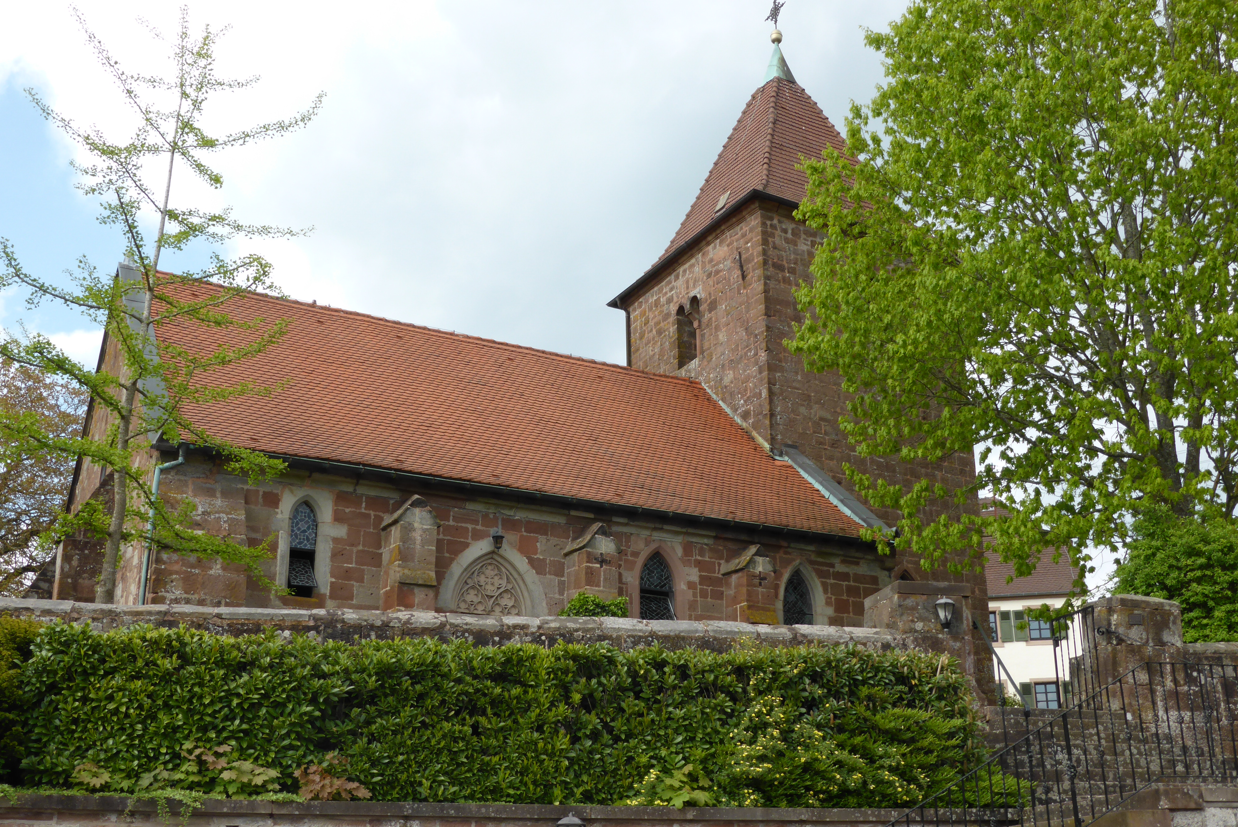 Pfarrkirche St. Martin, Großbundenbach, Südseite